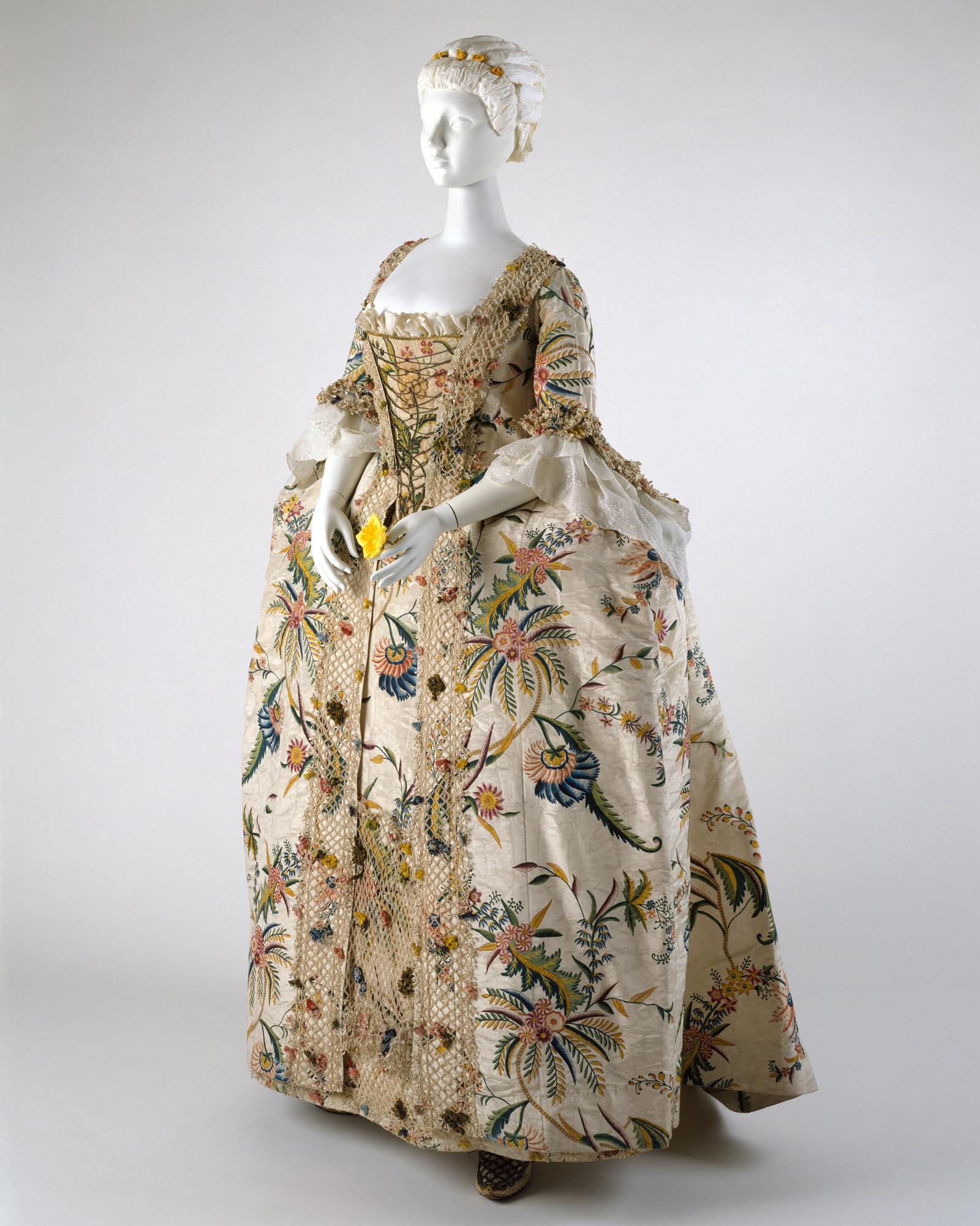 British; Robe à la Française